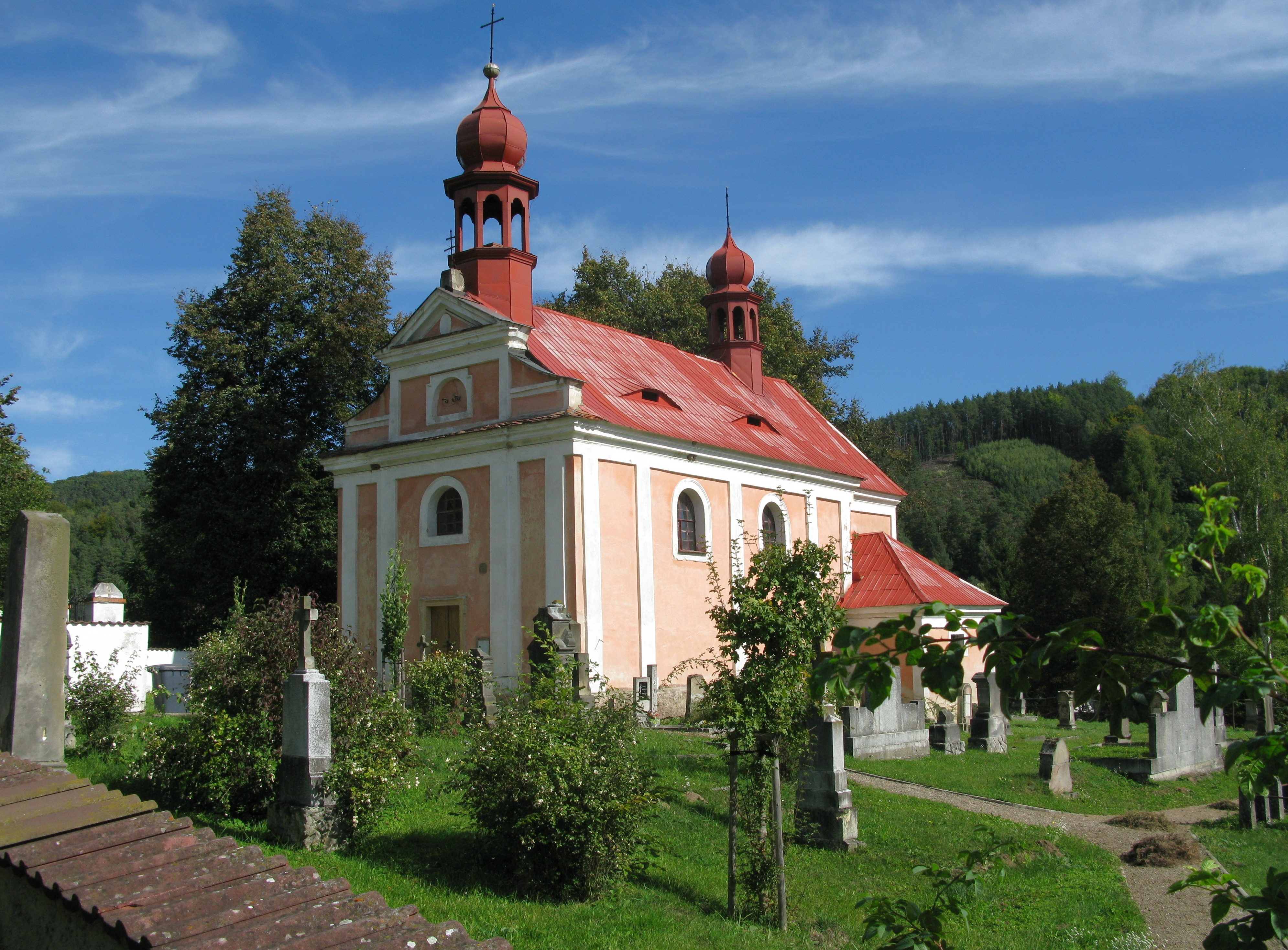 Barokní kostel sv. Jakuba z r. 1712 s gotickými základy, proti němu fara, patrový omítnutý srub s mansardovou střechou z r. 1794.